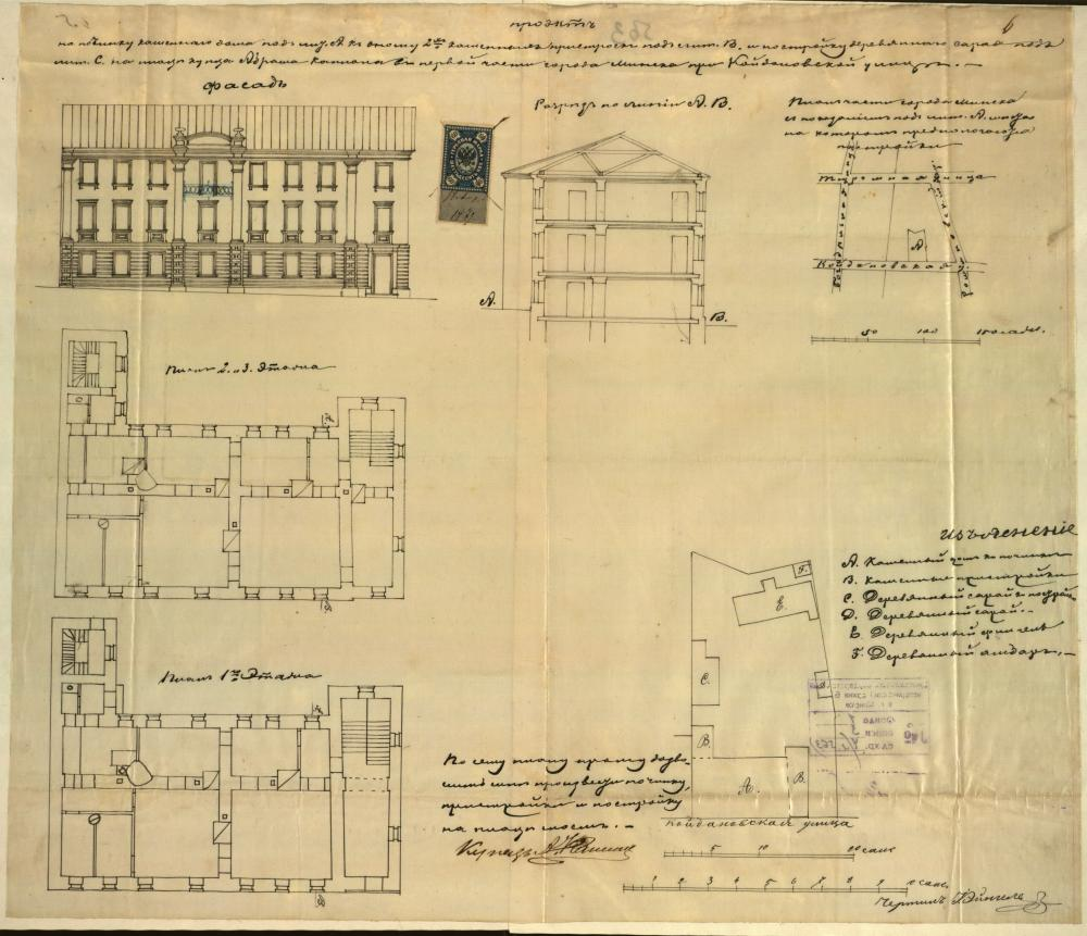 Беларуская (тарашкевіца): Менск (Miensk), вуліца Койданаўская (vulica Kojdanaŭskaja). Праект на рэканструкцыю мураванага трохпавярховага жылога дома і гаспадарчых пабудоваў А. Каплана